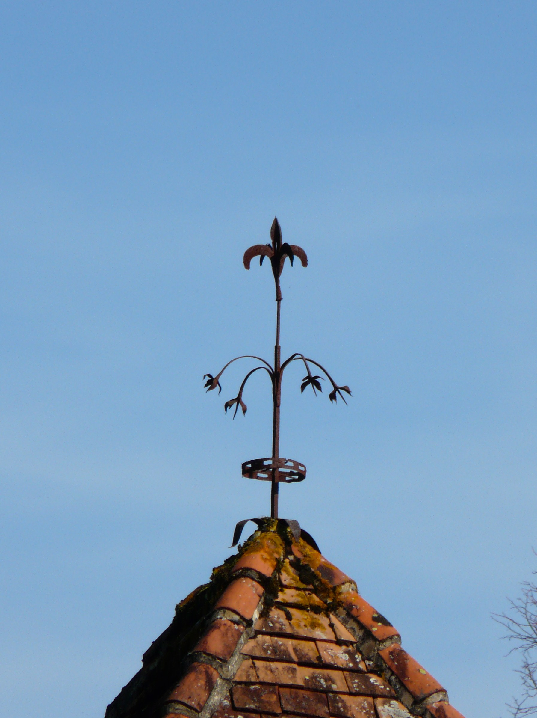 Épi de faîtage du château de la Chalupie, Eyliac, Dordogne, France.